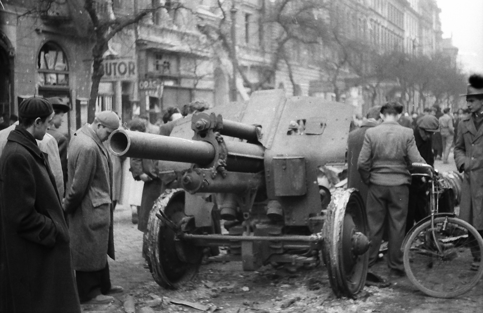 Budapest IX. Ferenc körút 36 - 38., a Tűzoltó utcával szemben. 122 mm-es 1938 mintájú tarack (M–30)